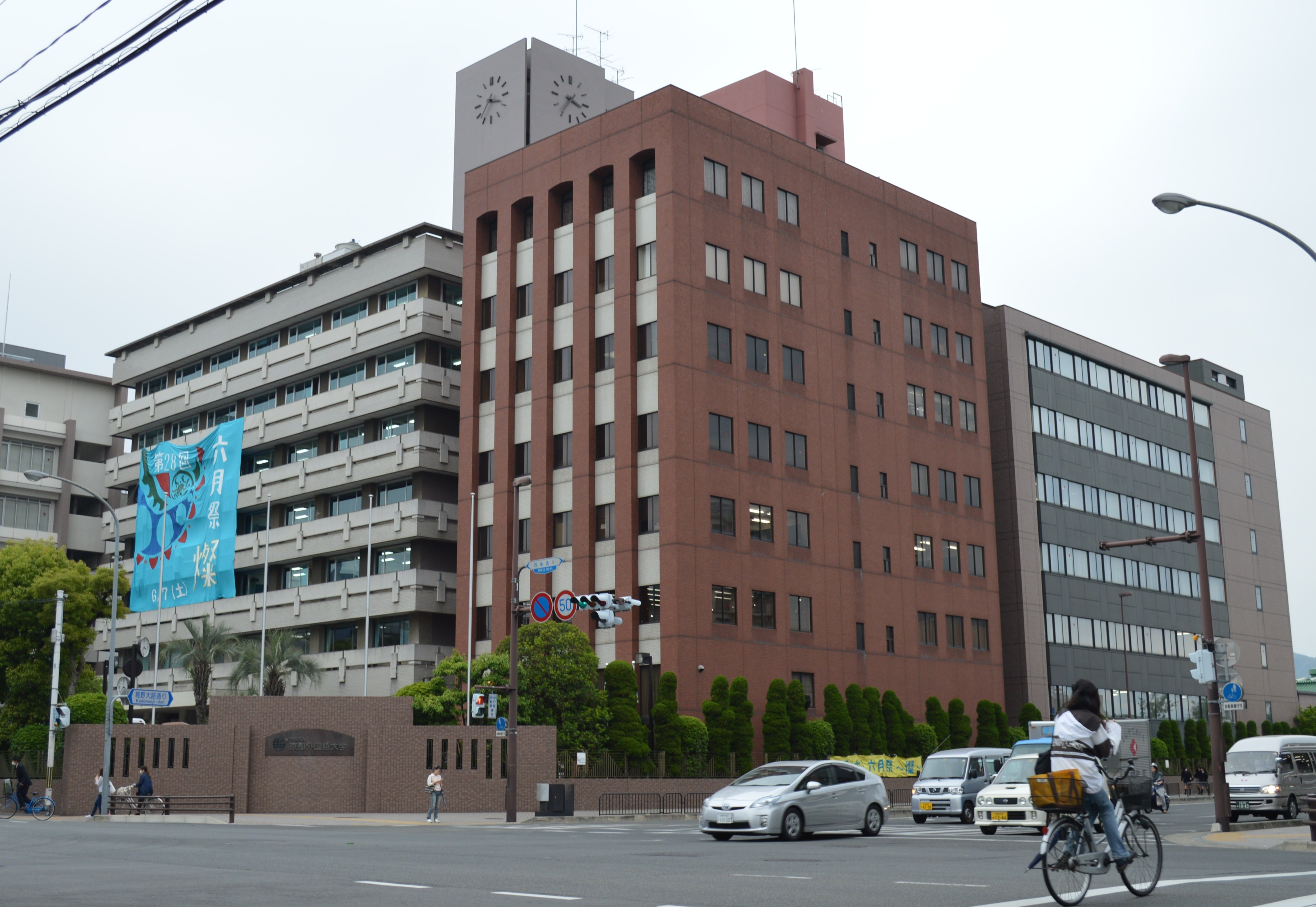 京都外国語大学